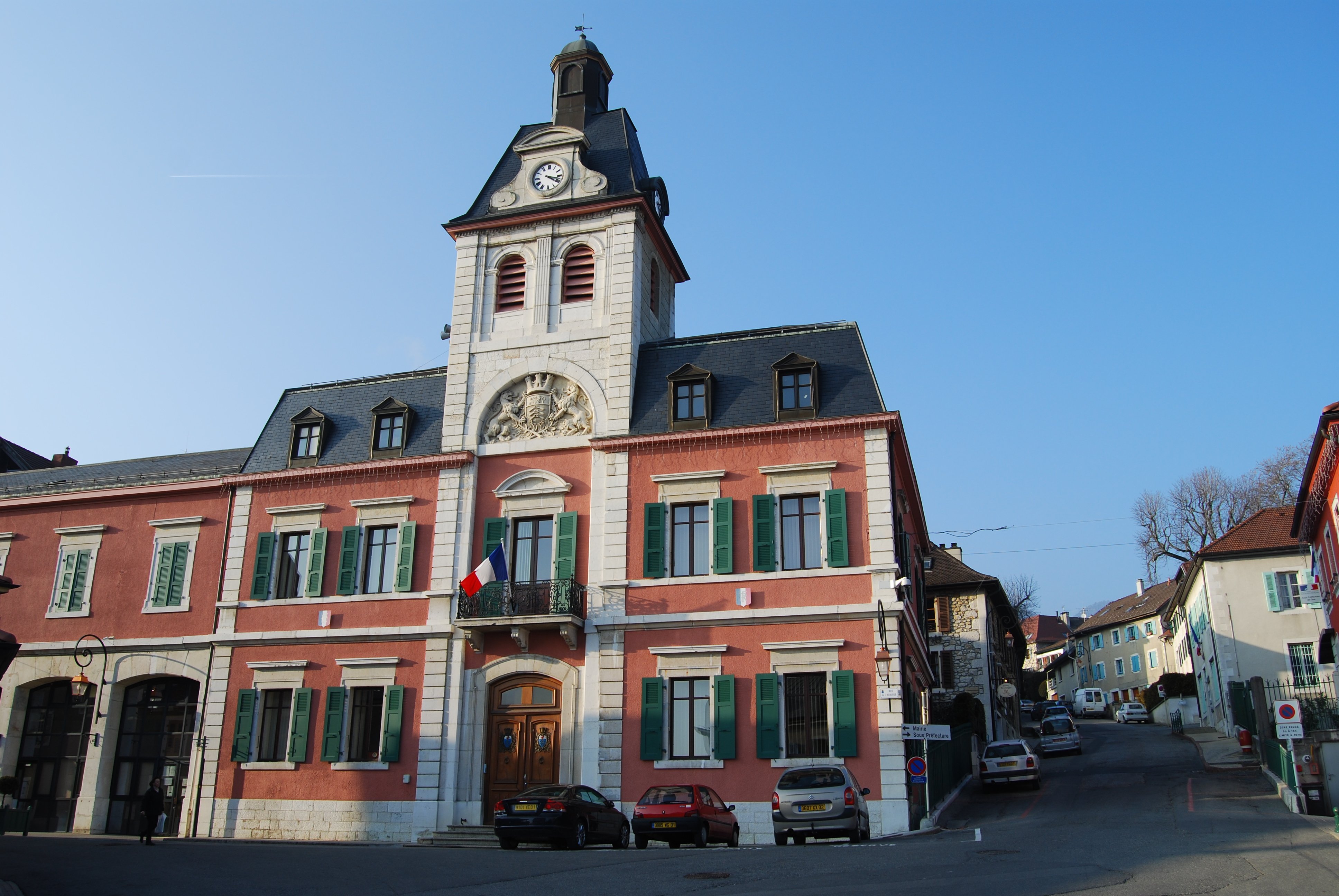 Hôtel de ville de Gex, département de l'Ain, France